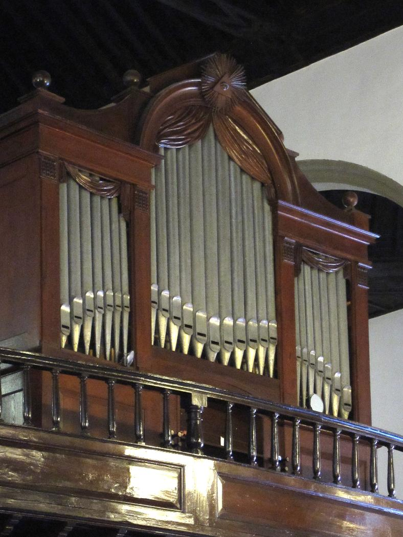 Teneriffa, Puerto de la Cruz, Kirche Nuestra Señora de la Peña de Francia, Orgelprospekt, Foto 2013